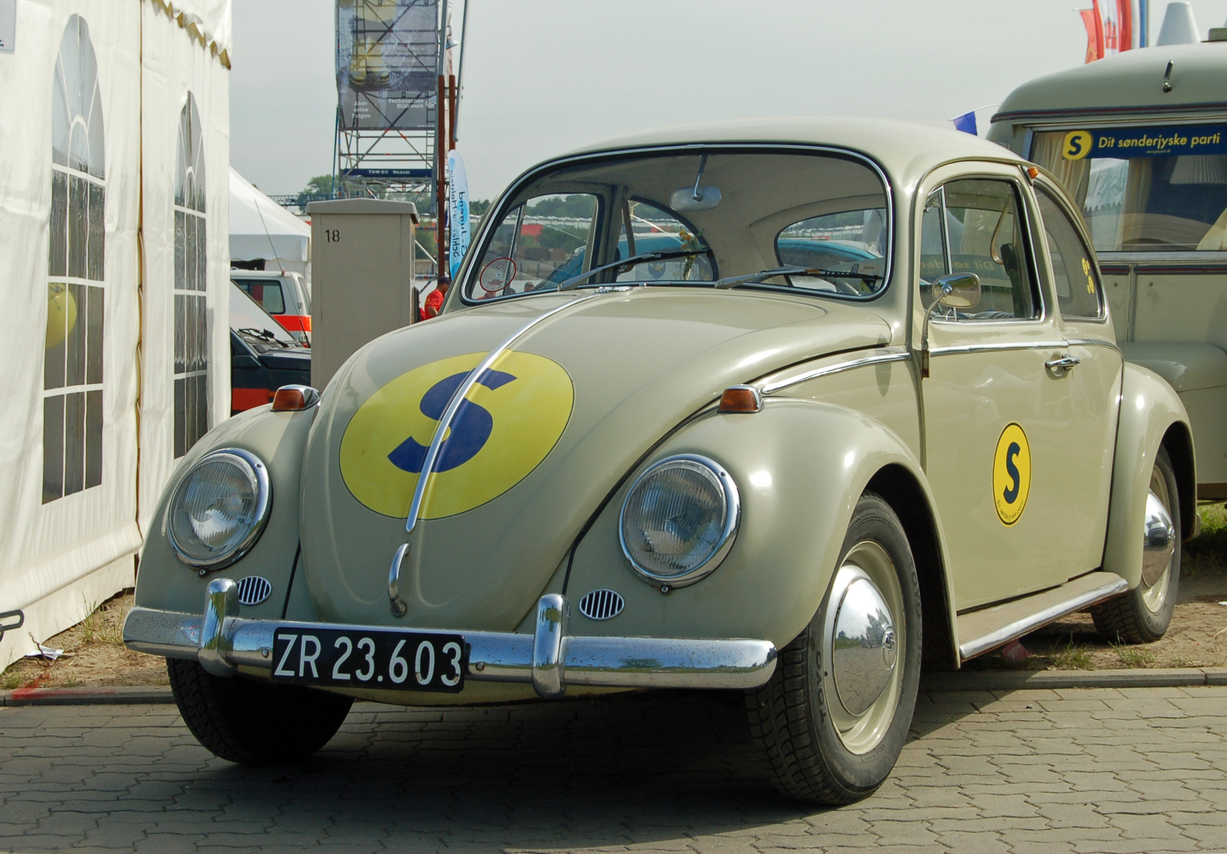 VW Käfer der Schleswigsche Partei beim Schleswig-Holstein-Tag 2010 in Rendsburg